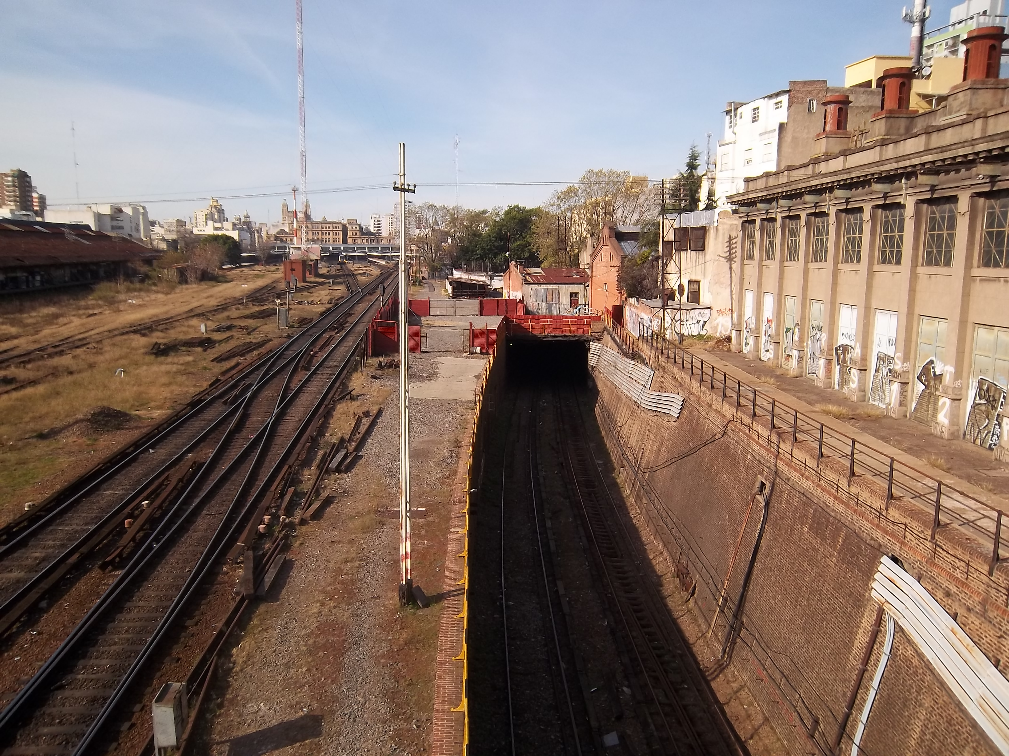 Túnel del Ferrocarril Sarmiento de acceso a la estación Miserere desde el puente peatonal de la calle Sánchez de Bustamante, en la ciudad de Buenos Aires, Argentina.